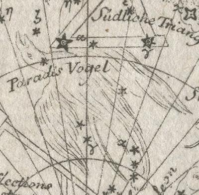 Template:Nach Commons verschieben (Bestätigung nötig) Sternbild Apus, Stich von 1782